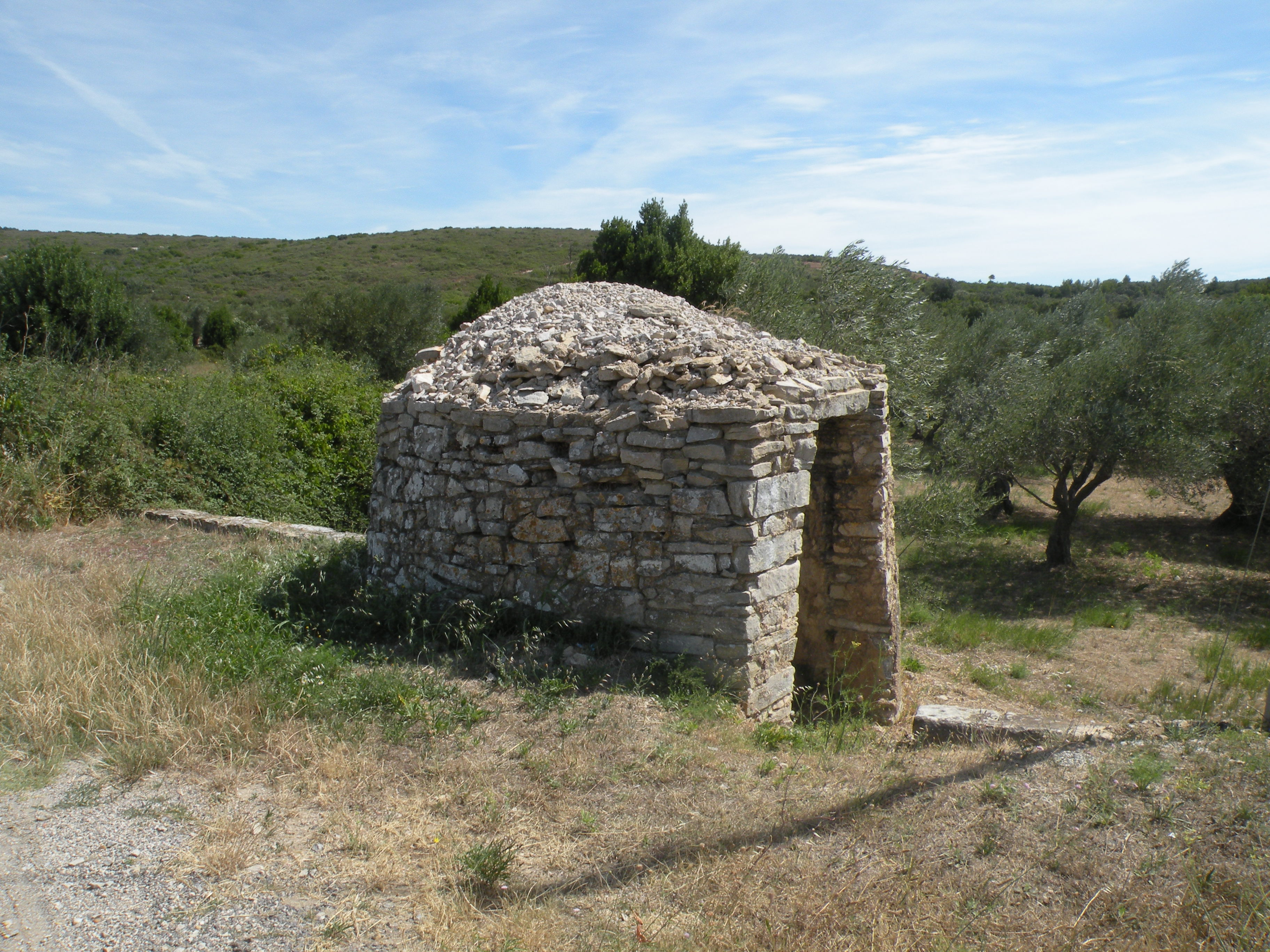 Capitelle à la sortie de Marguerittes